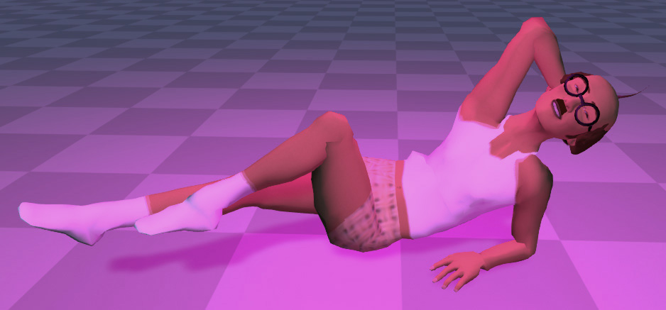 加藤茶のギャグ「ちょっとだけよ」の例